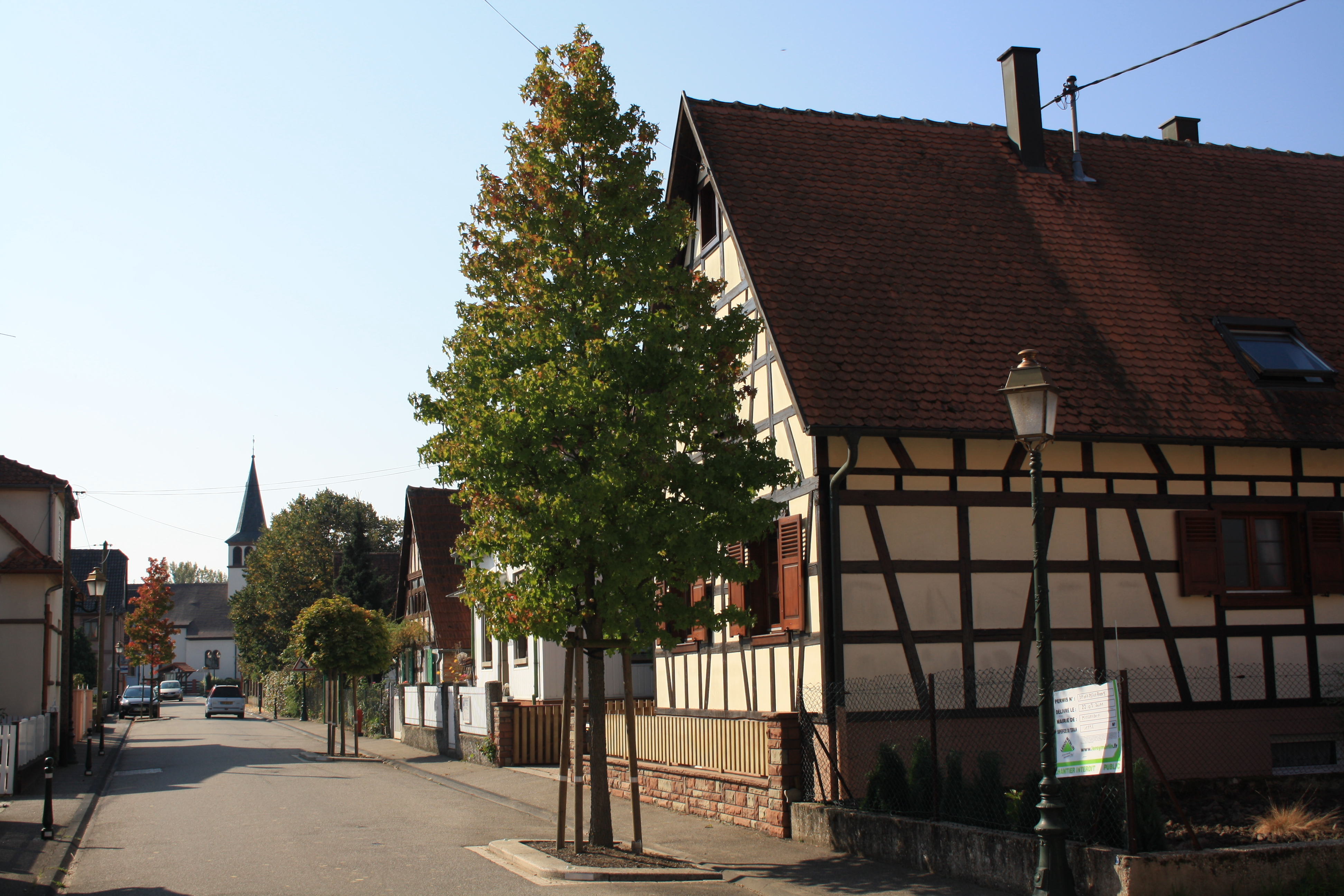 Rue Principale, Kesseldorf